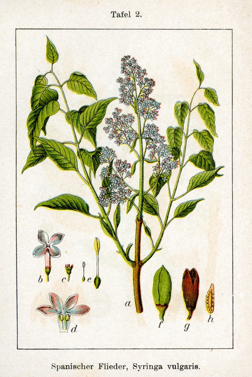 Syringa vulgaris L. Original Description Spanischer Flieder, Syringa vulgaris